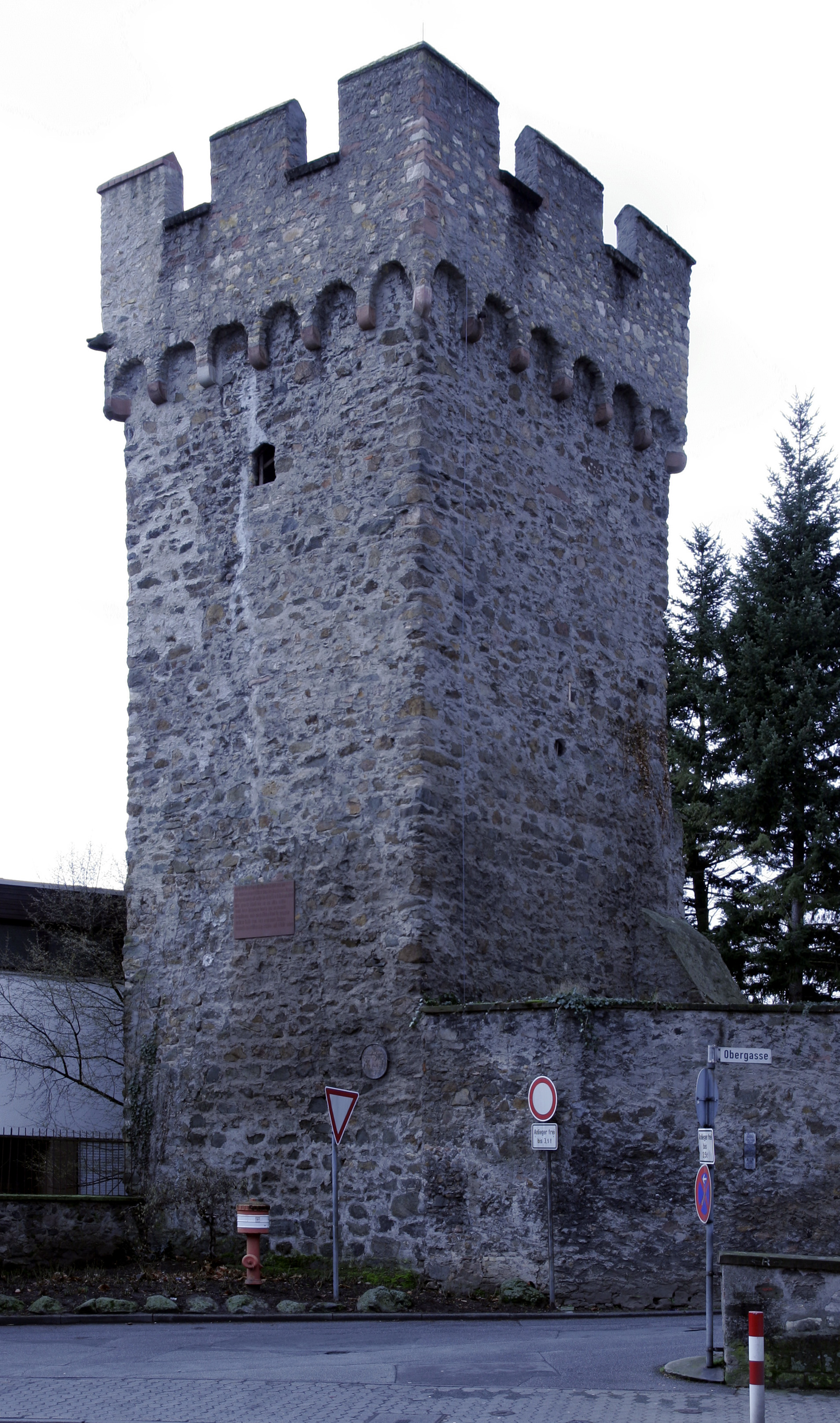 Roter Turm in Bensheim, von ca. 1300